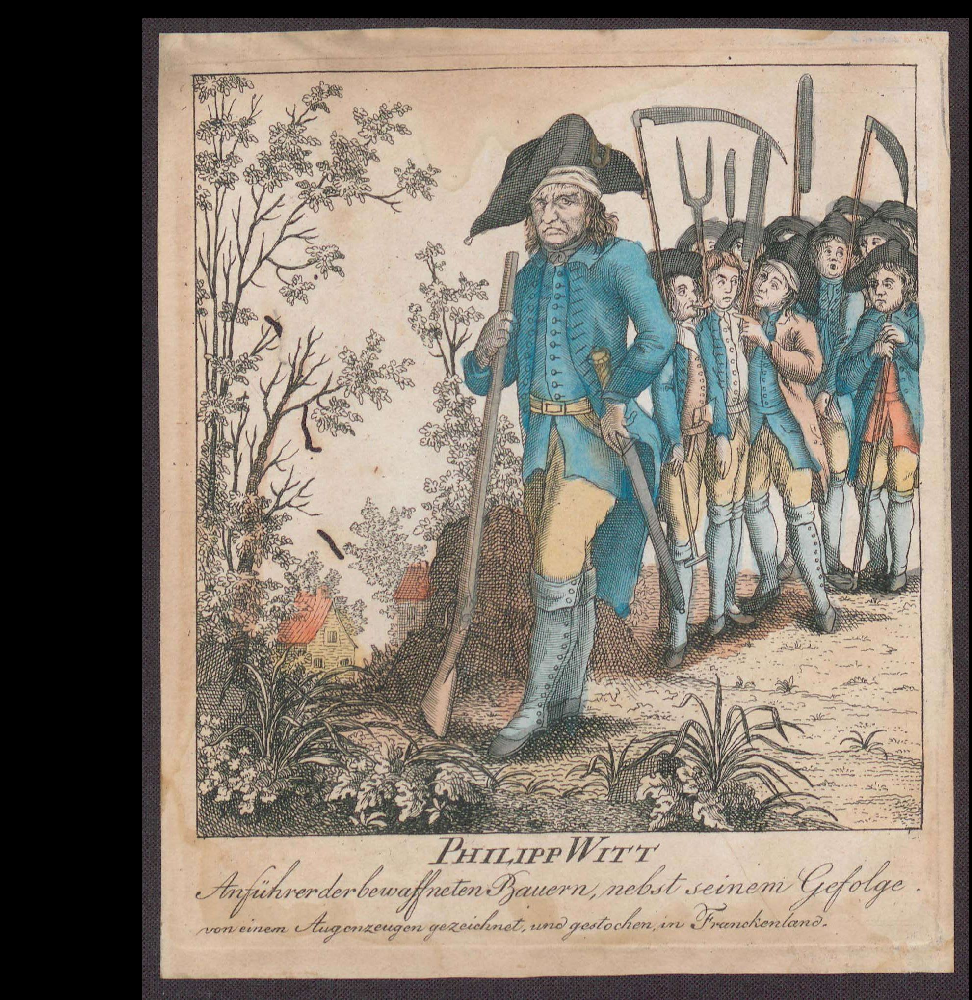 Colorierter Stich: "Philipp Witt, Anführer der bewaffneten Bauern, nebst seinem Gefolge, von einem Augenzeugen gezeichnet und gestochen in Franckenlande."